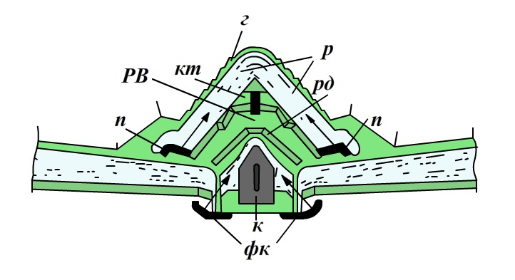 Сложный капонирный фронт.